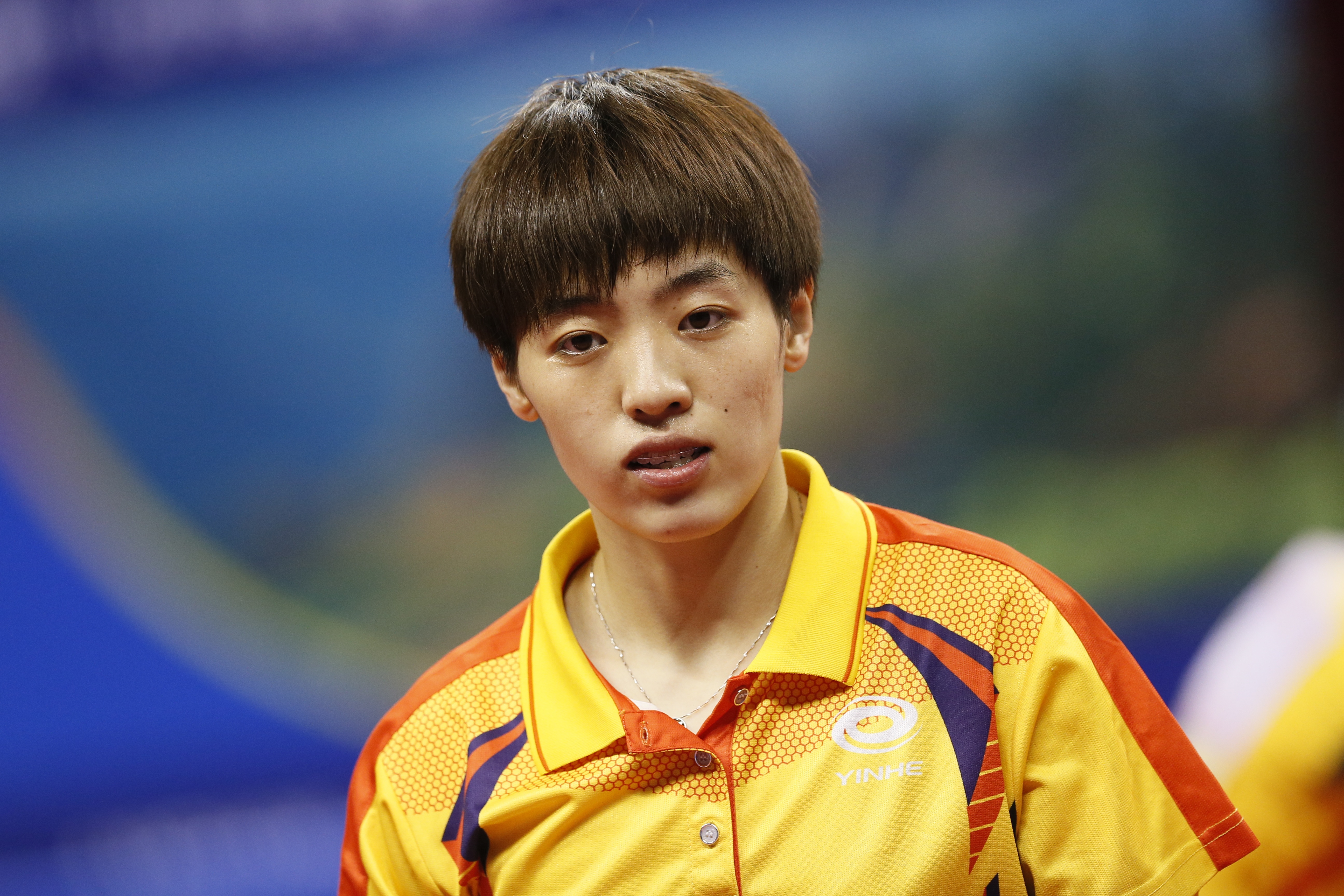 _K0K2571